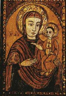 Gnadenbild Maria Pötsch